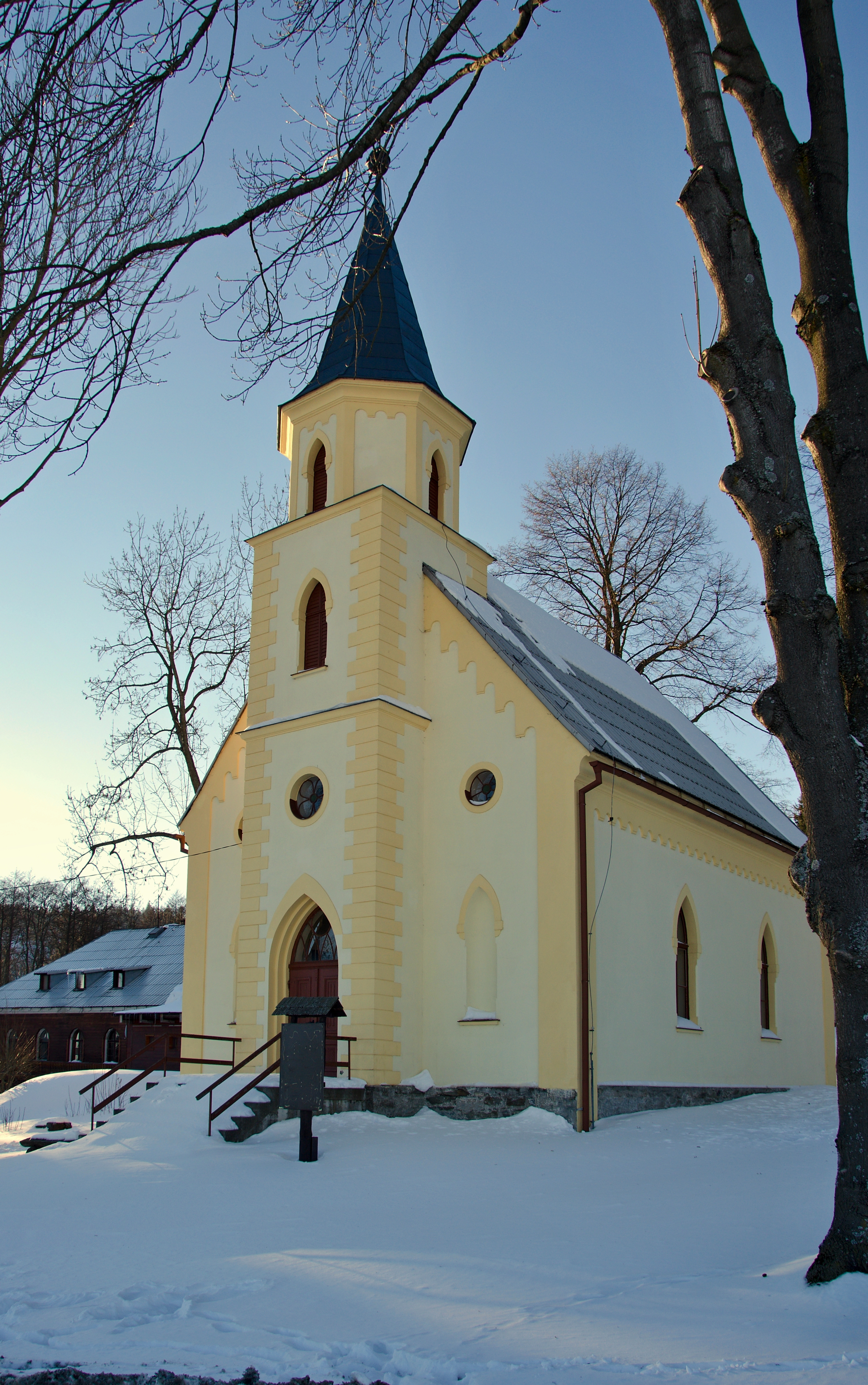 Kaple svaté Anny v Nové Vsi, místní části obce Dolní Moravice v okrese Bruntál